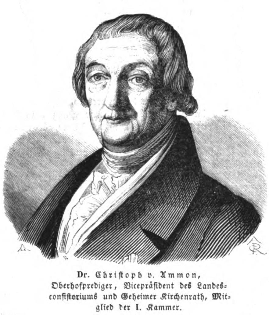 Christoph Friedrich Ammon, Theologe und Abgeordneter des Sächsischen Landtages, 1847.